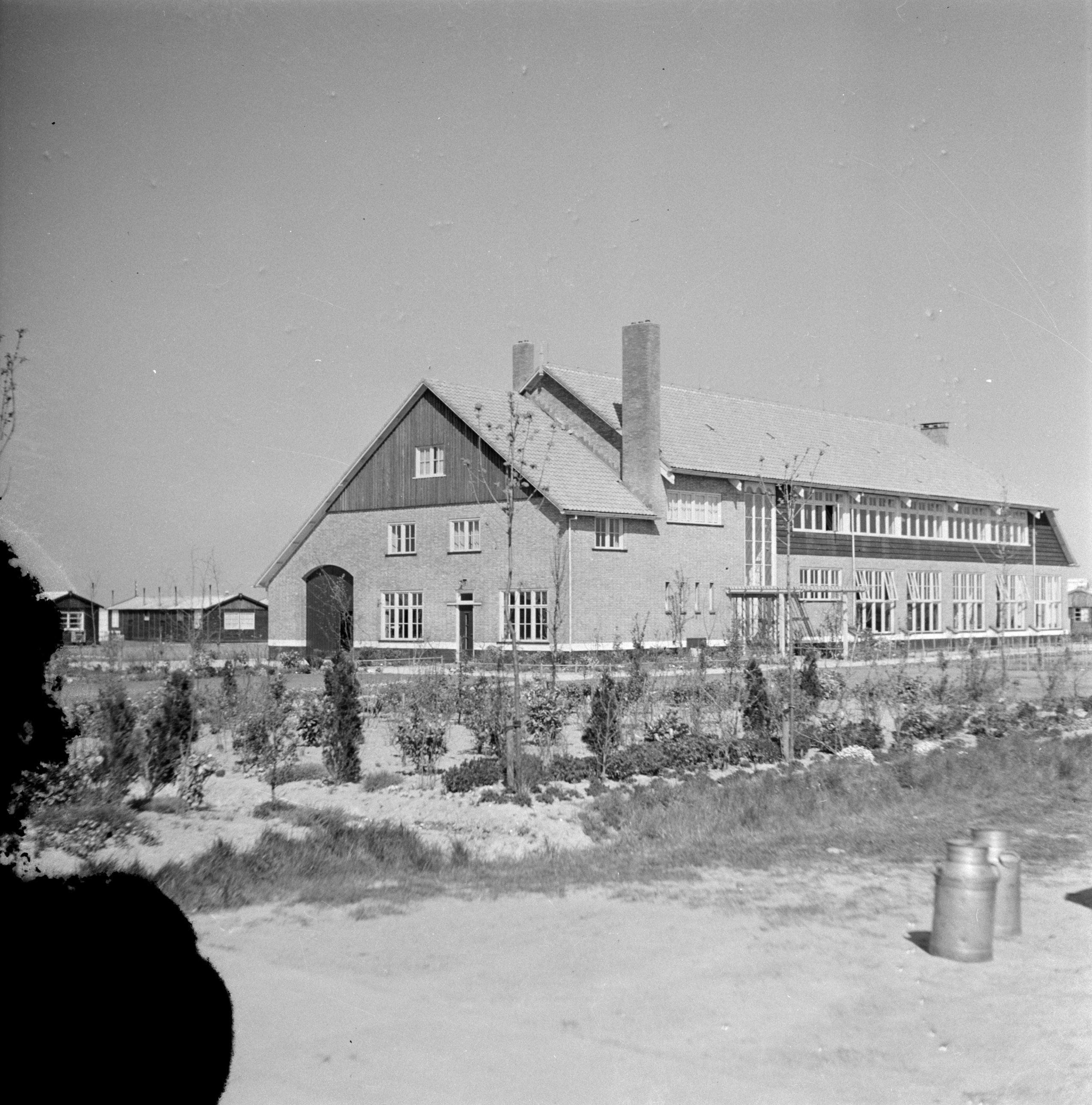 Collectie / Archief : Fotocollectie Van de Poll Reportage / Serie : Joods Werkdorp Wieringermeer Beschrijving : Gebouw van het Joodse werkdorp bij Nieuwesluis in de Wieringermeer Annotatie : In het werkdorp woonden Joodse vluchtelingen die werkten aan de drooglegging van de Wieringermeer Datum : 1936 Locatie : Noord-Holland, Wieringermeer Trefwoorden : gebouwen, joodse religie Fotograaf : Poll, Willem van de Auteursrechthebbende : Nationaal Archief Materiaalsoort : Negatief (6x6) Nummer archiefinventaris : bekijk toegang 2.24.14.02 Bestanddeelnummer : 254-4896